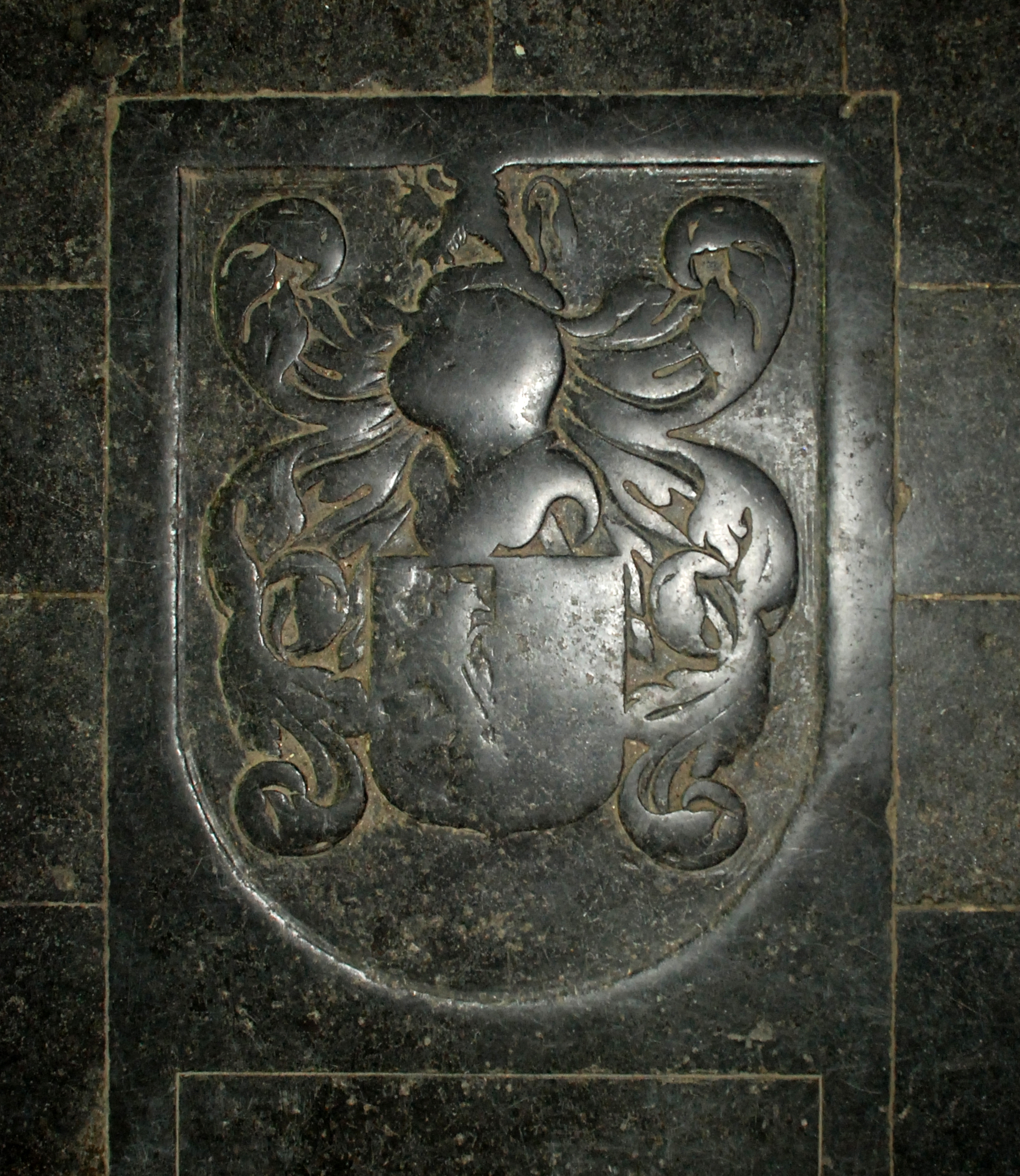 Belgique - Brabant wallon - Église de Court-Saint-Étienne